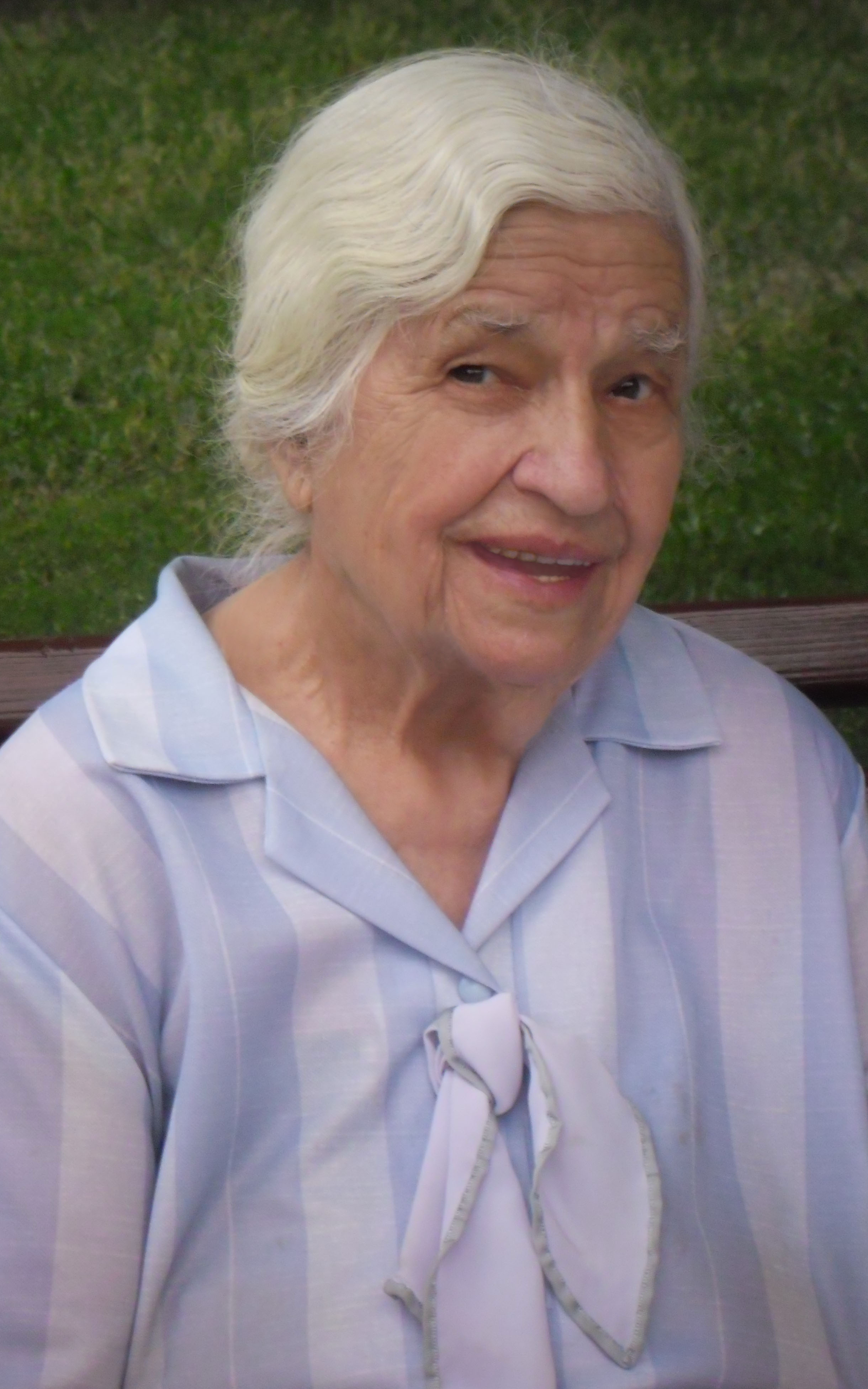 Иванюшенко Лидия Никаноровна (1920-2011) - хормейстер, педагог Харьковской средней специальной музыкальной школы-интерната.